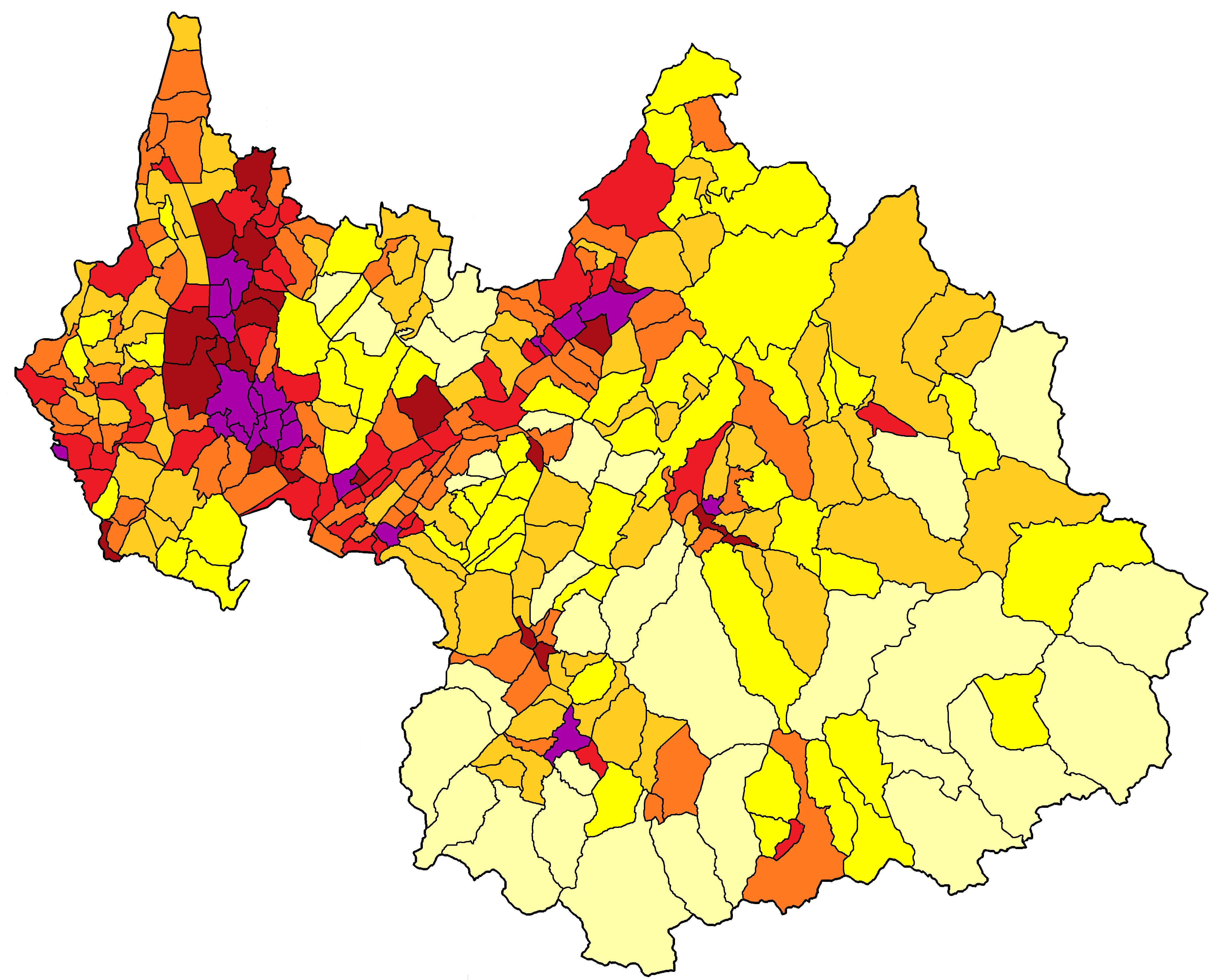 English (en): Map of the French department of Savoie. Is here shown the population density by commune from the 2009 figures. Less than 10 inhabitants per square kilometer Less than 25 inhabitants per square kilometer Less than 50 inhabitants per square kilometer Less than 100 inhabitants per square kilometer Less than 200 inhabitants per square kilometer Less than 500 inhabitants per square kilometer More than 500 inhabitants per square kilometer français (fr): Carte du département français de la Savoie. Est ici indiquée la densité de population par commune d'après les chiffres de 2009. Moins de 10 habitants par kilomètre carré Moins de 25 habitants par kilomètre carré Moins de 50 habitants par kilomètre carré Moins de 100 habitants par kilomètre carré Moins de 200 habitants par kilomètre carré Moins de 500 habitants par kilomètre carré Plus de 500 habitants par kilomètre carré